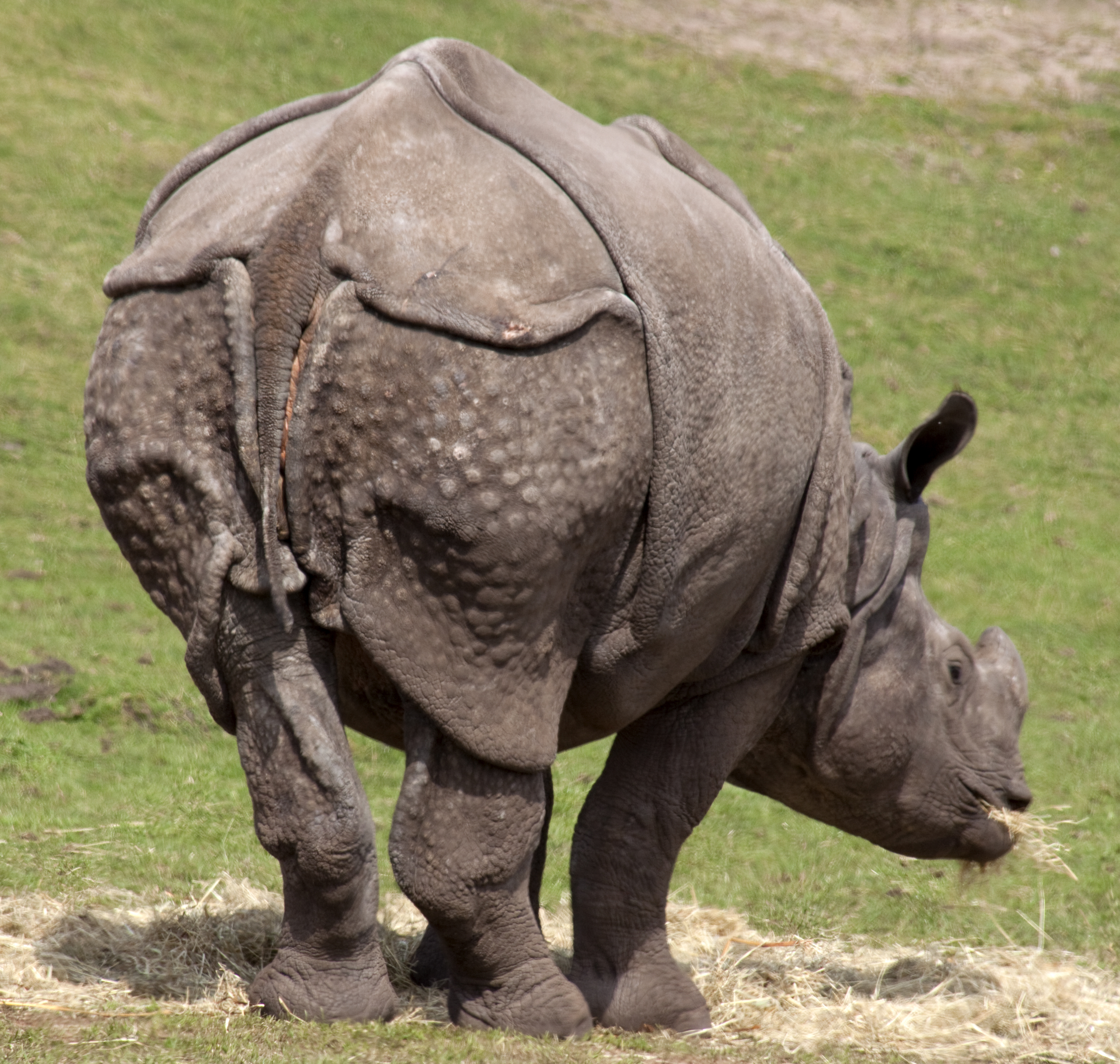 Rhino 1